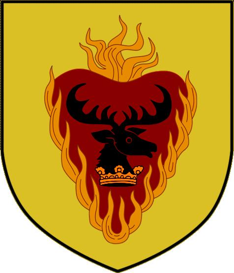 blason ficticio